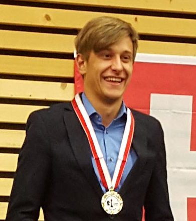 Siegerehrung bei der SEM 2016 in Flims. V.l.n.r.: Roland Lötscher (2.), Noël Studer (1.), Yannick Pelletier (3.).